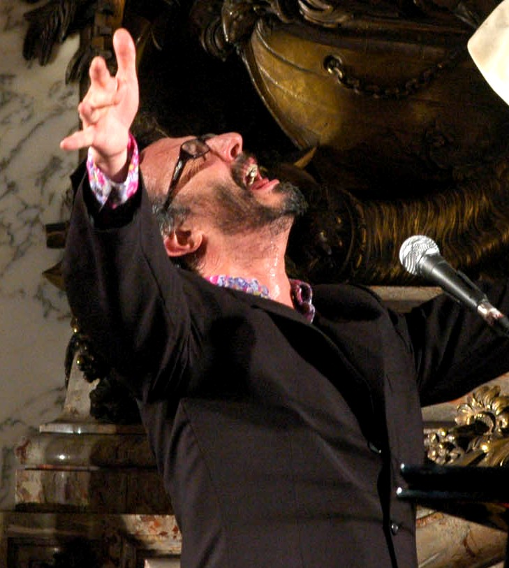 Fito Páez. En Casa Rosada. Foto oficial